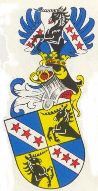 1 = Wappen des "Johann Peter Valerius von Herrlein auf Pfarrweisach", verliehen 1792 für ihn und seine Nachkommen.